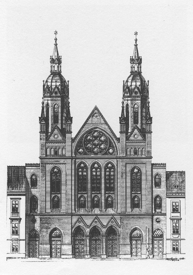 Synagoge Neudeggergasse in Wien-Josefstadt nach den Plänen von Max Fleischer